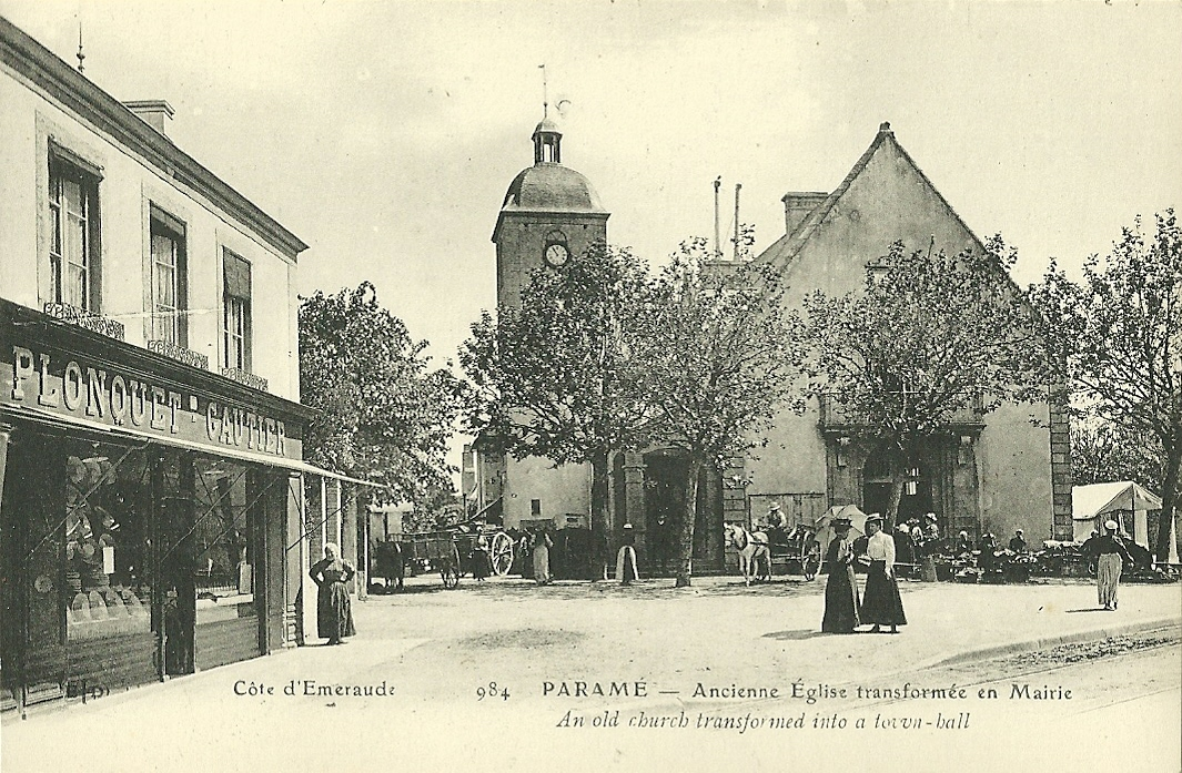 Vieille église du bourg de Paramé, actuellement mairie annexe de Saint Malo